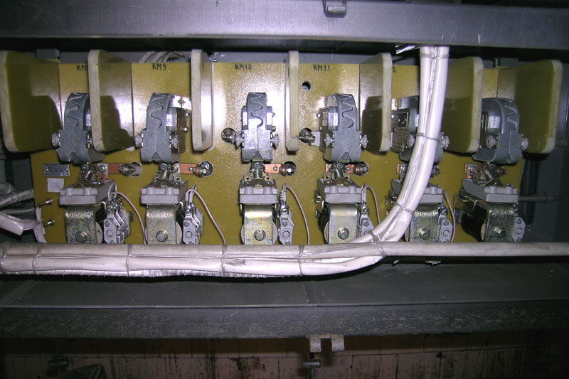 Контакторная панель КТСУ трамвайного вагона 71-619КТ.